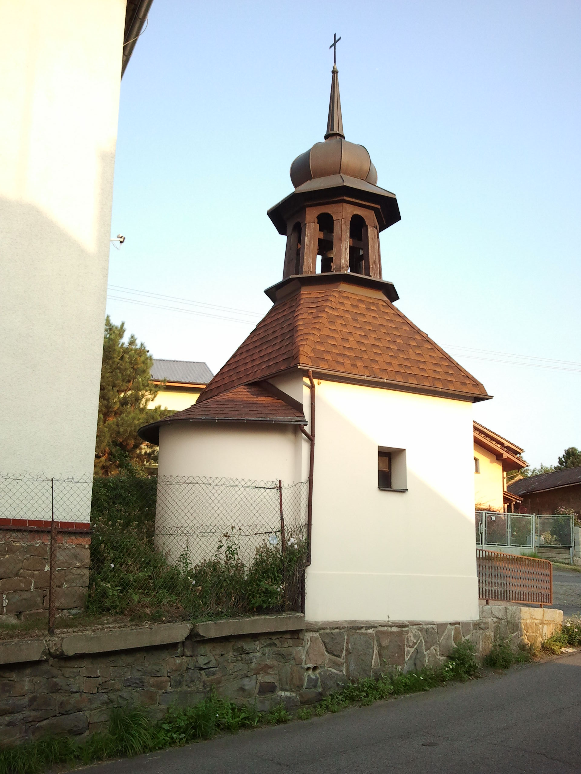 Kaple se zvoničkou (Vřesina), u čp. 51, Vřesina